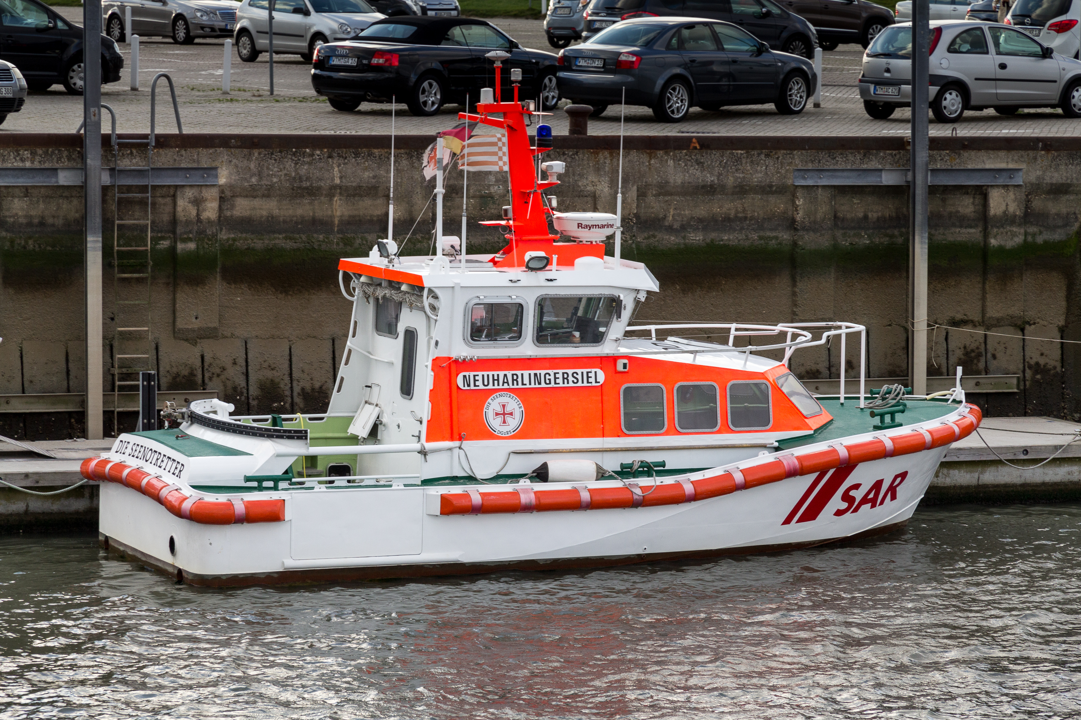 SAR "Neuharlingersiel" Seenotrettungsboot der 9,5m-Klasse der DGzRS im Hafen von Neuharlingersiel